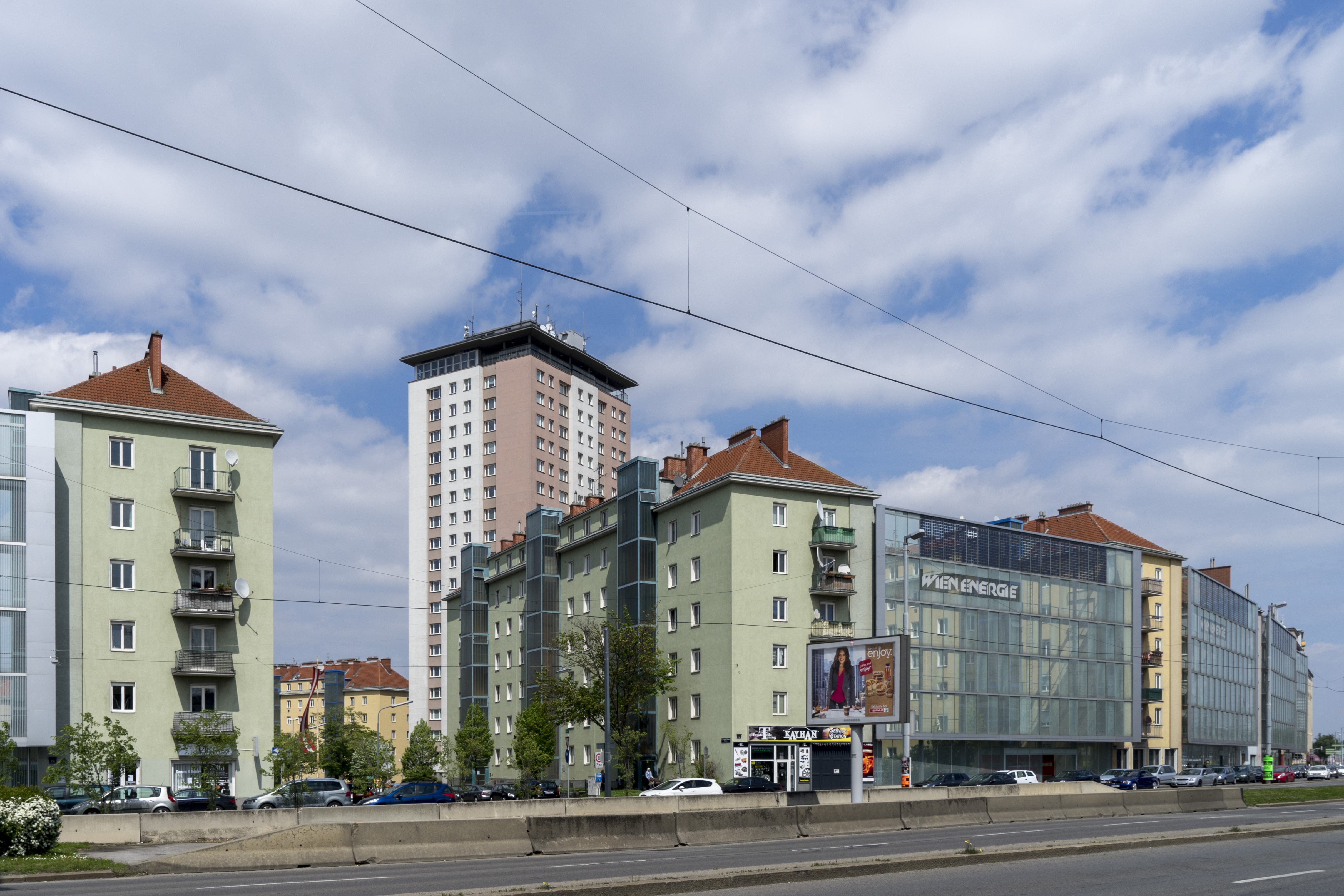 Theodor-Körner-Hof This media shows the Vienna residential building (Gemeindebau) with the ID 103. Object location48° 10′ 52.81″ N, 16° 21′ 25.5″ E